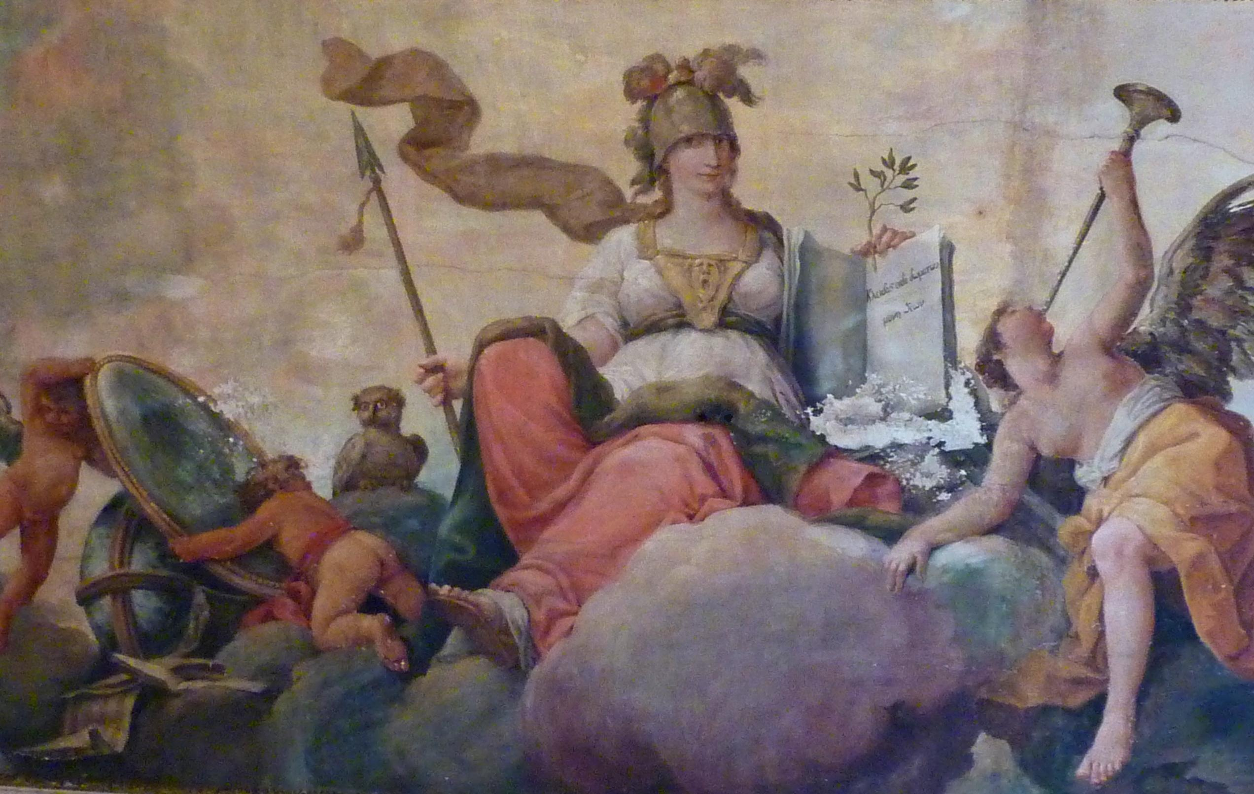 Allegoria della Giustizia, affresco di Domenico Muzzi sulla volta di una sala privata del Palazzo Dalla Rosa Prati (Parma). Cortesia della famiglia Dalla Rosa Prati.